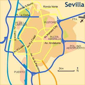 Plano_de_sevilla usado para Sevilla